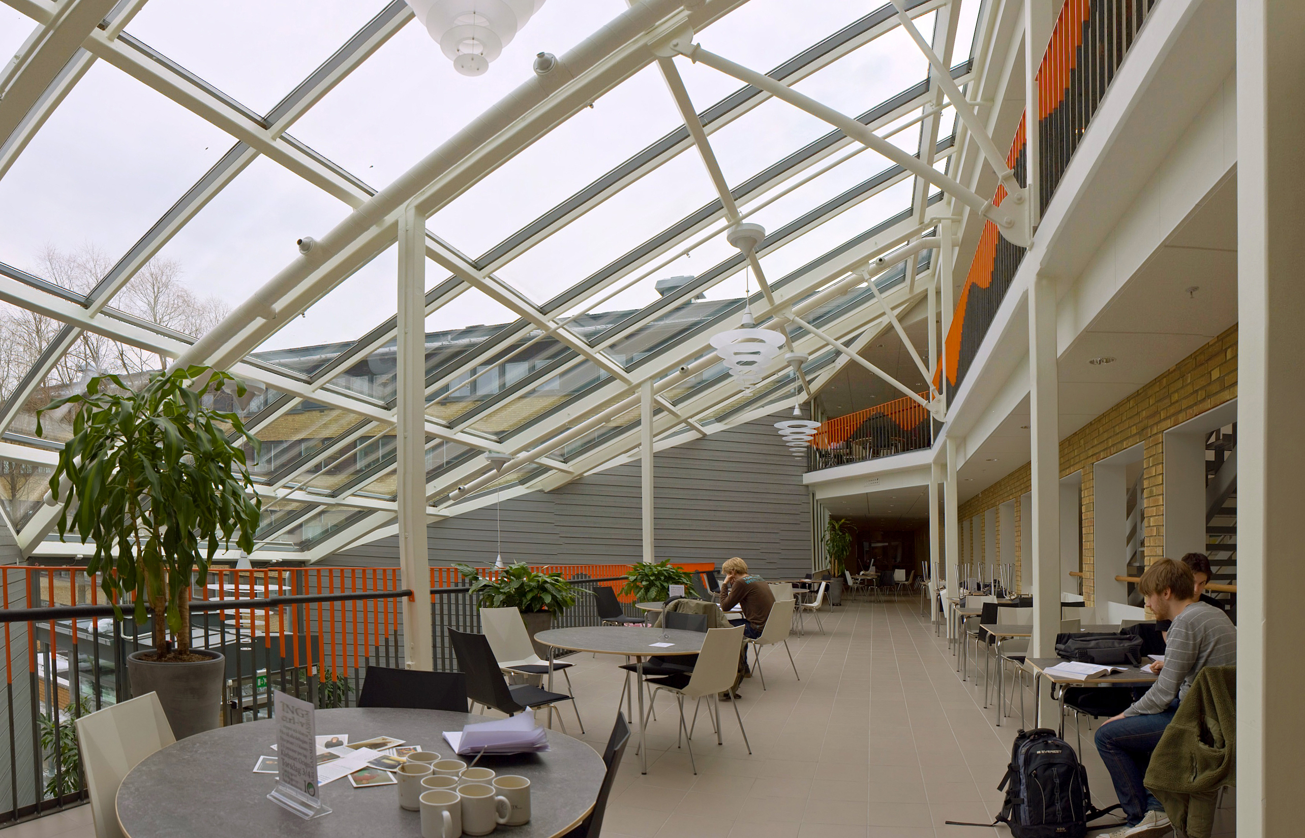 Naturvetarhuset, ljusgård. 080403.